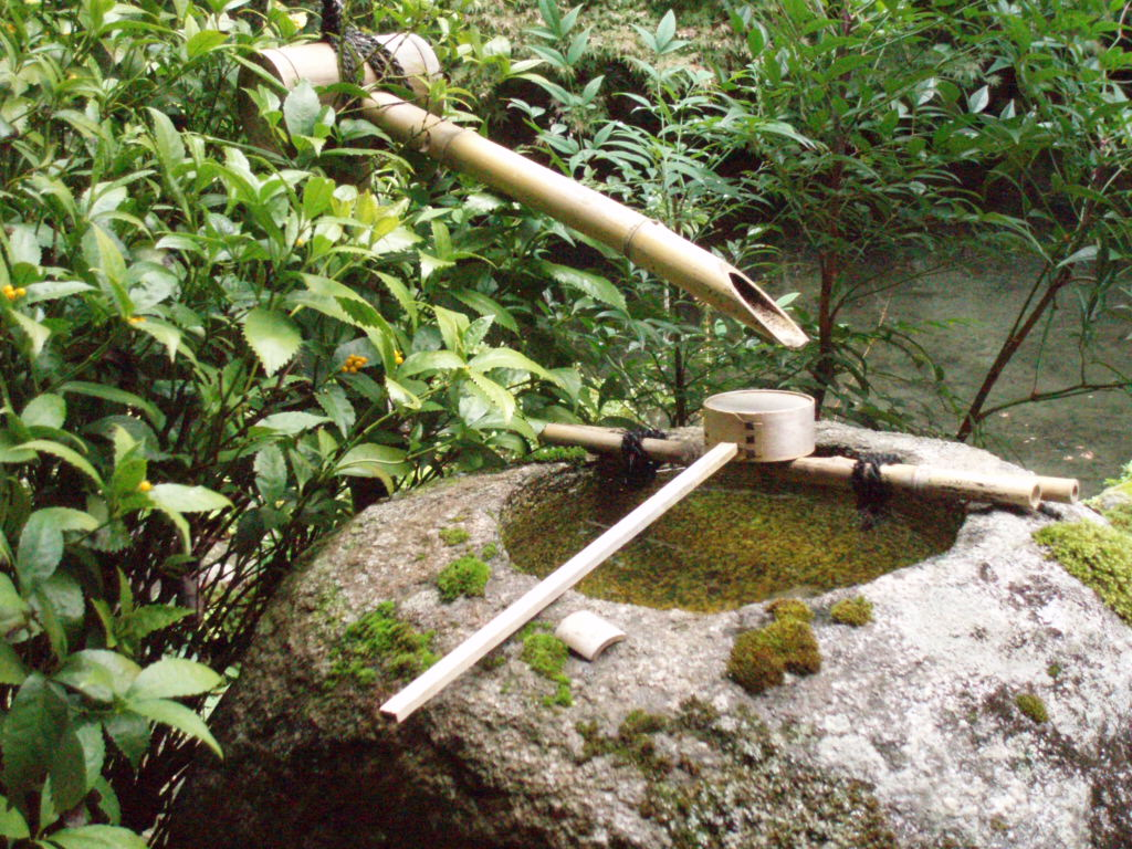 蓮華寺庭園のつくばい